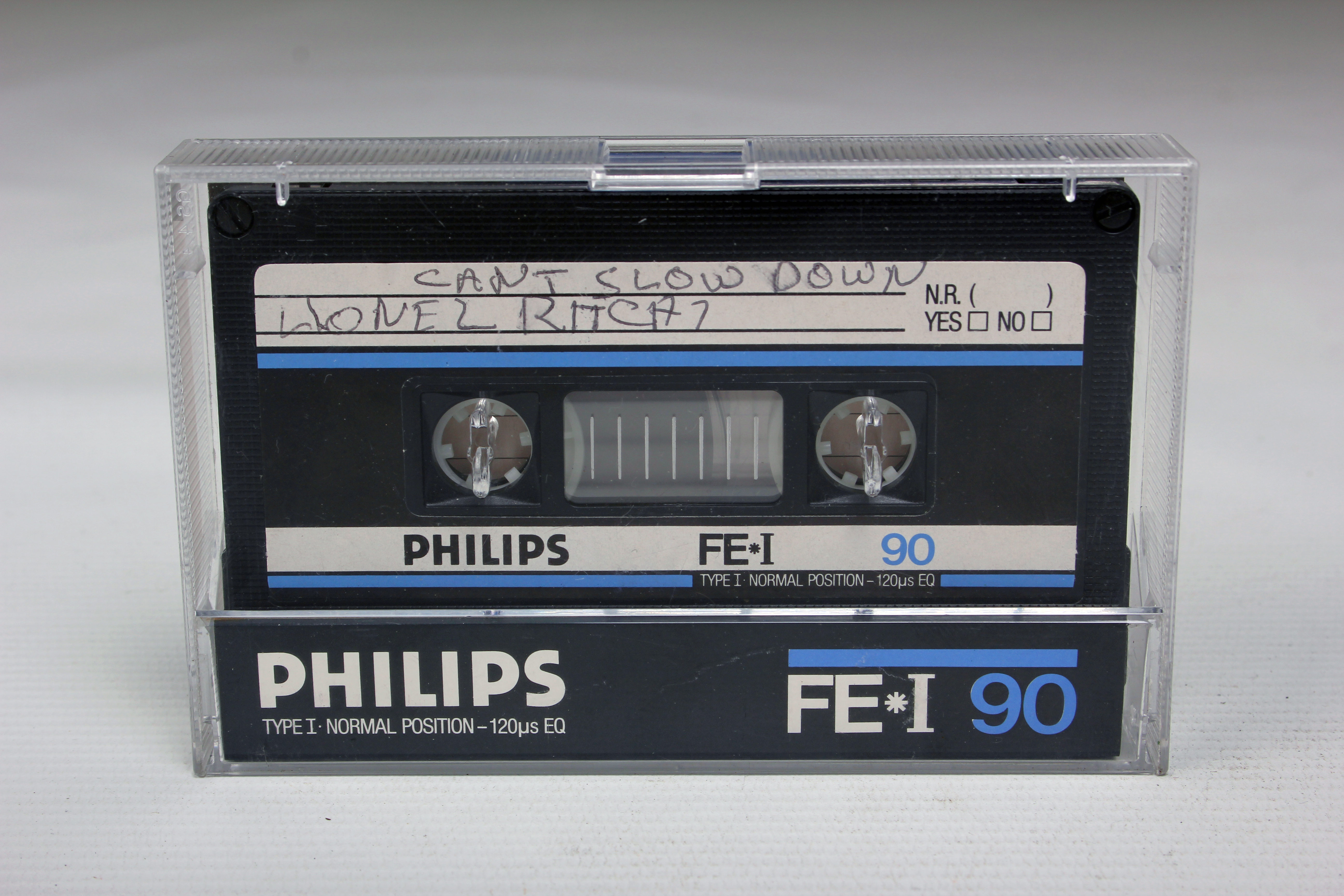 IMG_6684-mod